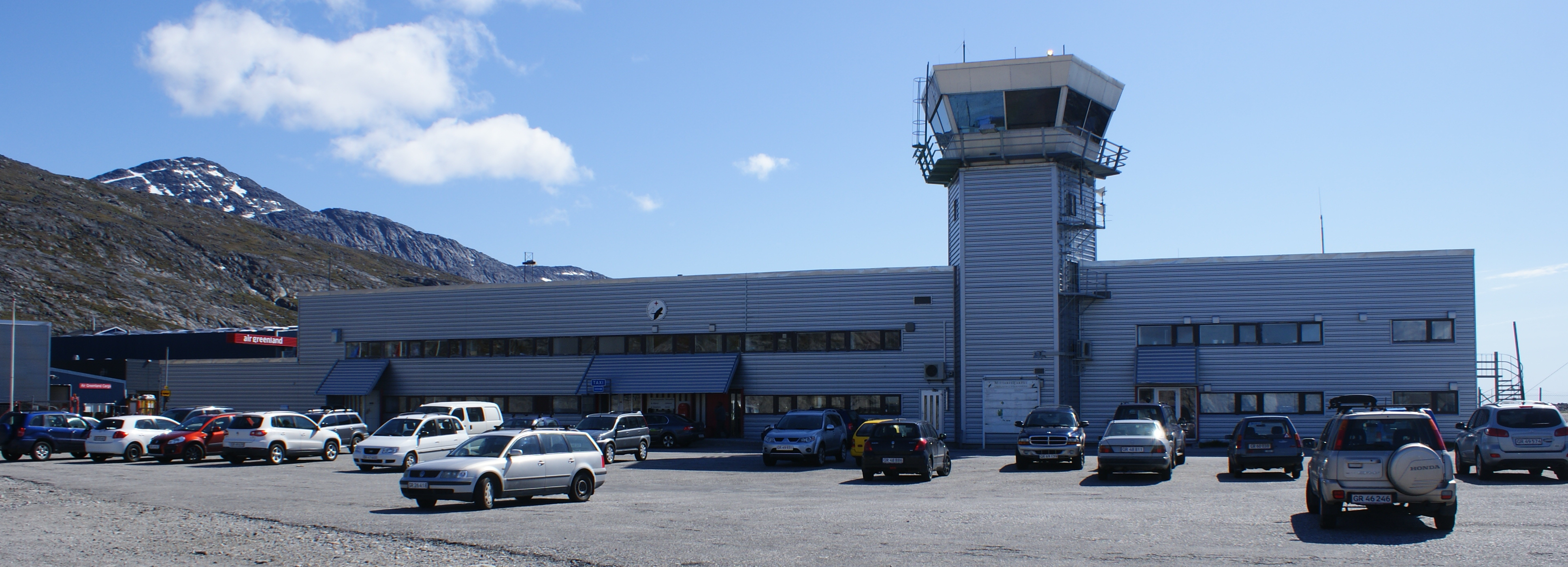 Nuuk Airport (GOH), Greenland.